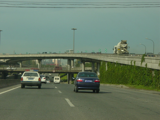 北京岳各莊交匯點 (DF08 (中文) 2004年图片)